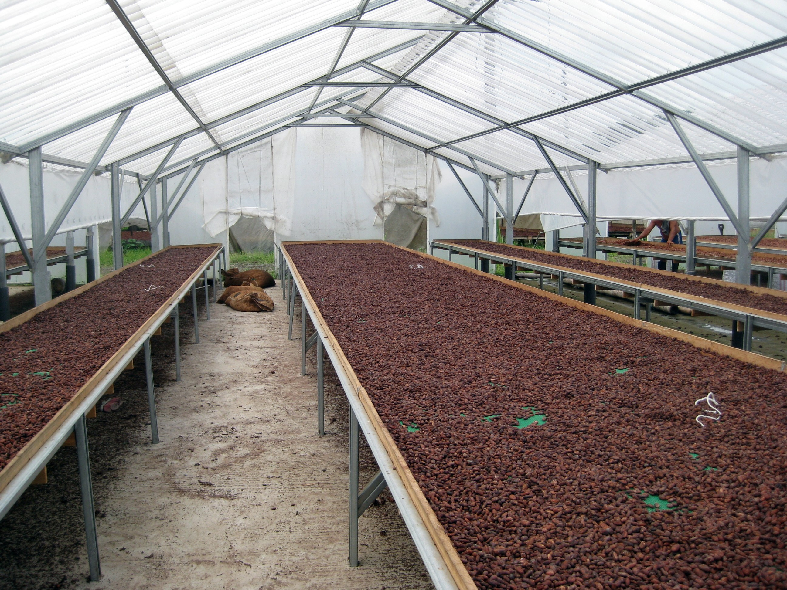 Secadora de Cacao, tipo invernadero